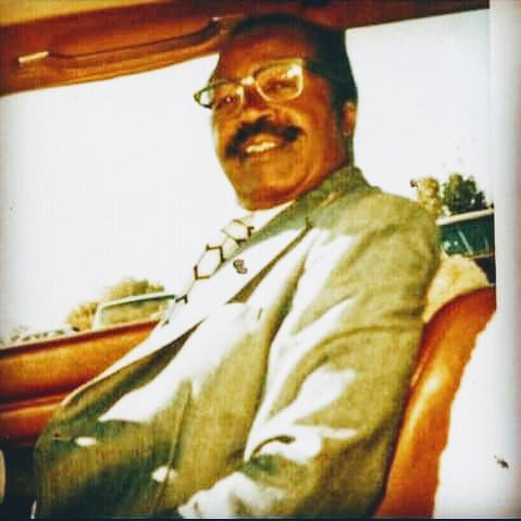 George Tawengwa